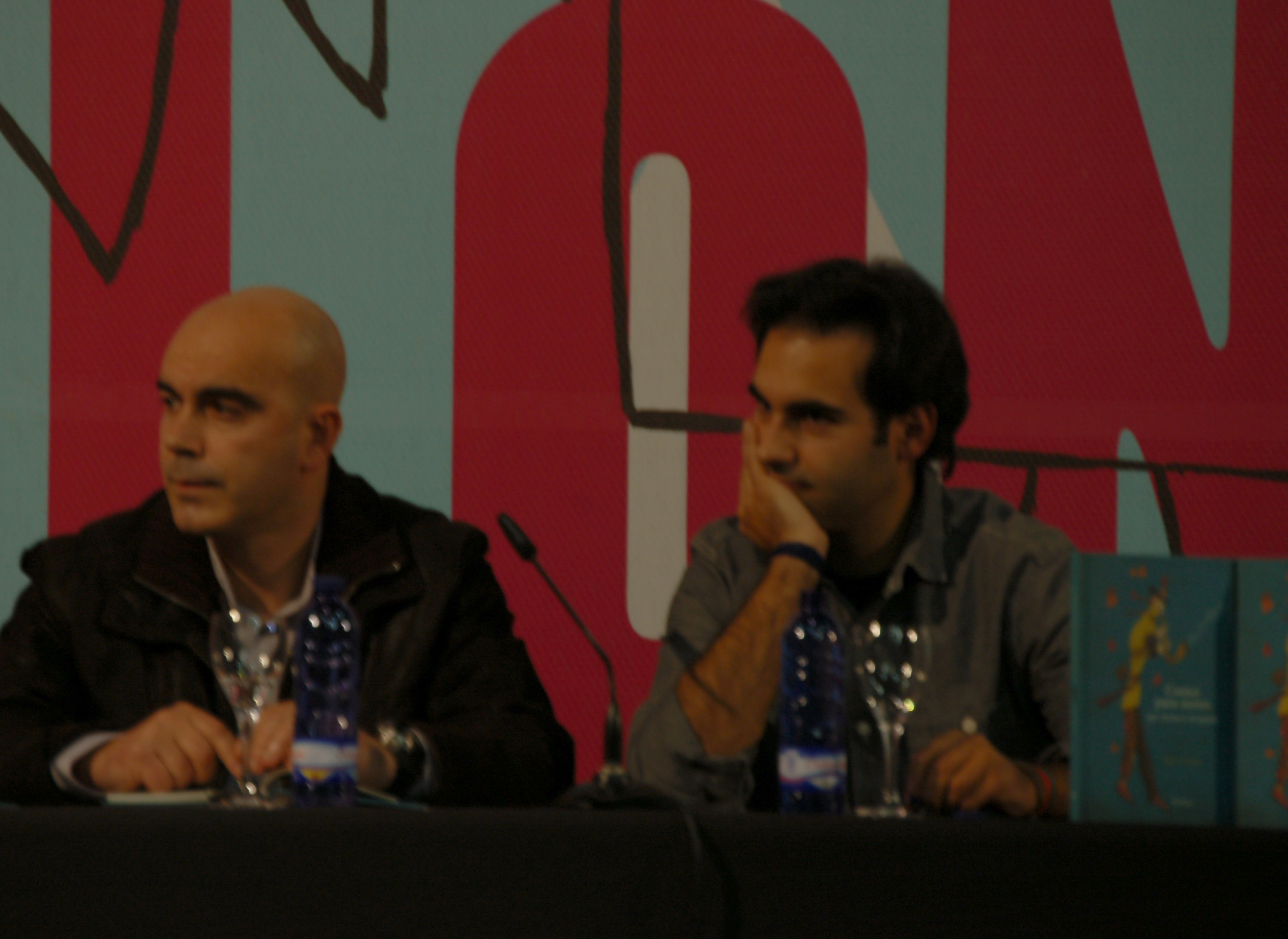 Pinto e Chinto no Culturgal 2010